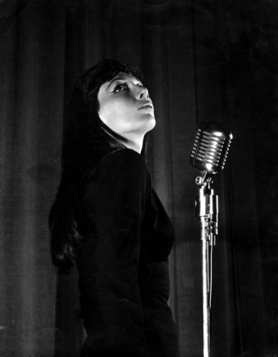 Juliëtte Greco achter de microfoon, 1961